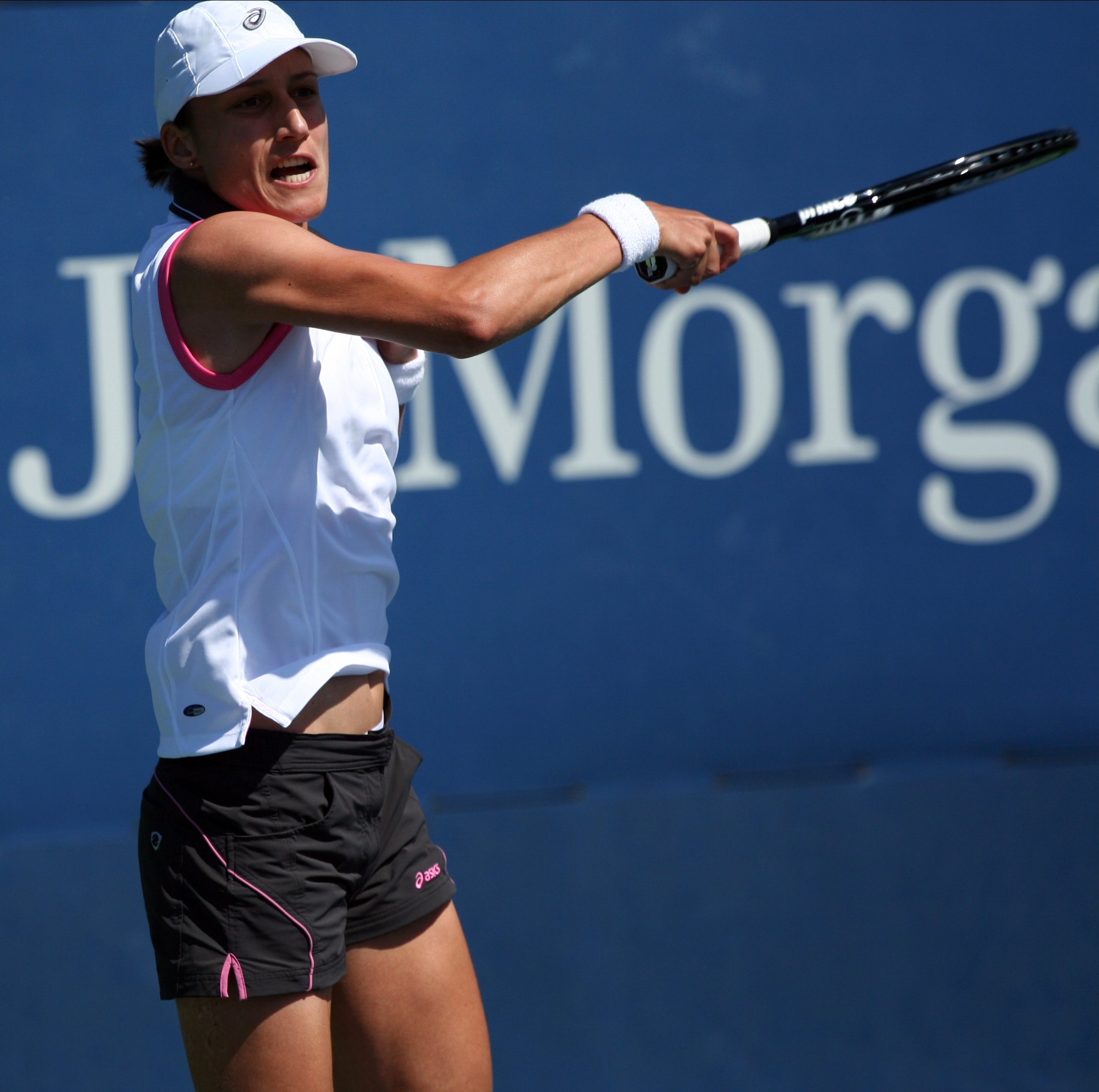 U.S. Open Wednesday, Sept. 2, 2009